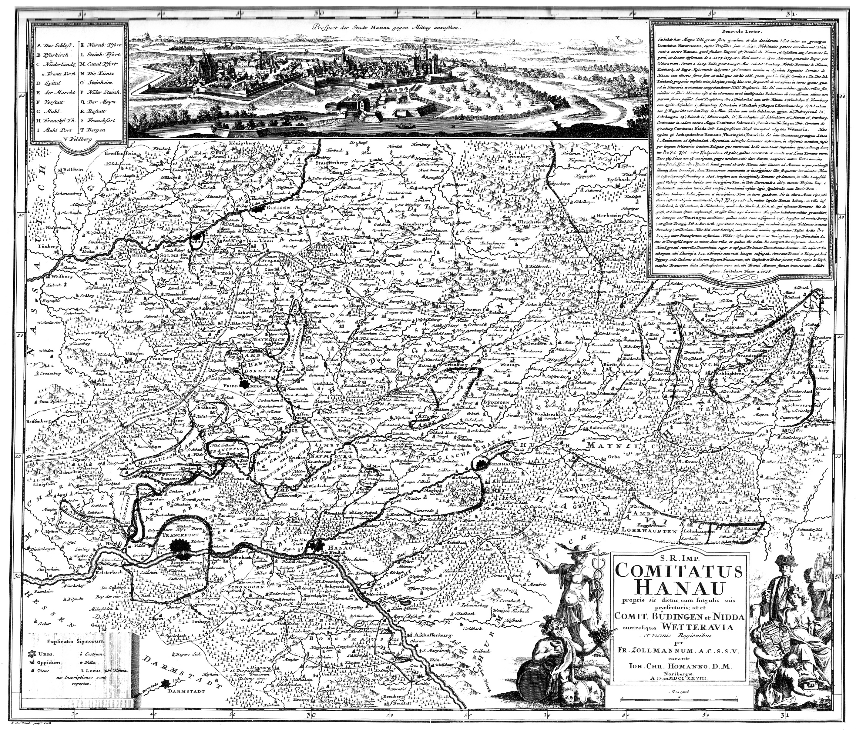 comitatus hanau - Karte der Grafschaft Hanau und angrenzender Gebiete. Eine der ersten Karten mit Einzeichnung des Limes